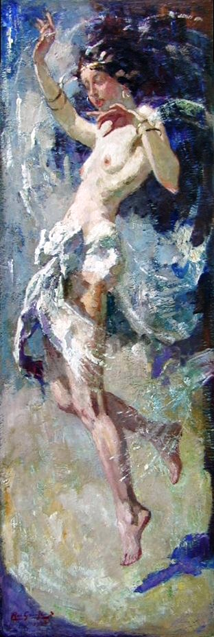 Danseres